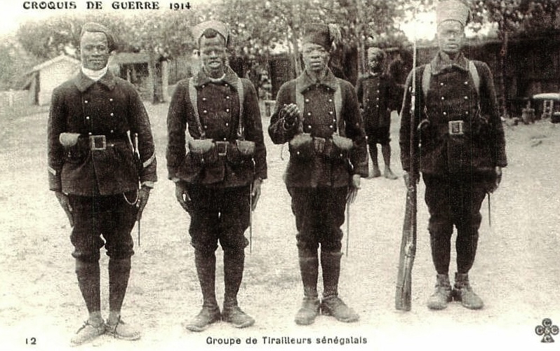 Tirailleurs sénégalais, groupe, croquis de guerre 1914 ; carte postale ancienne